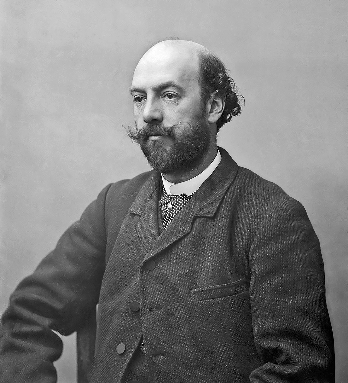 Vers 1898. Portrait en plan taille de Félix Regnault. De 3/4, costume, cravate à pois, barbe et moustache.